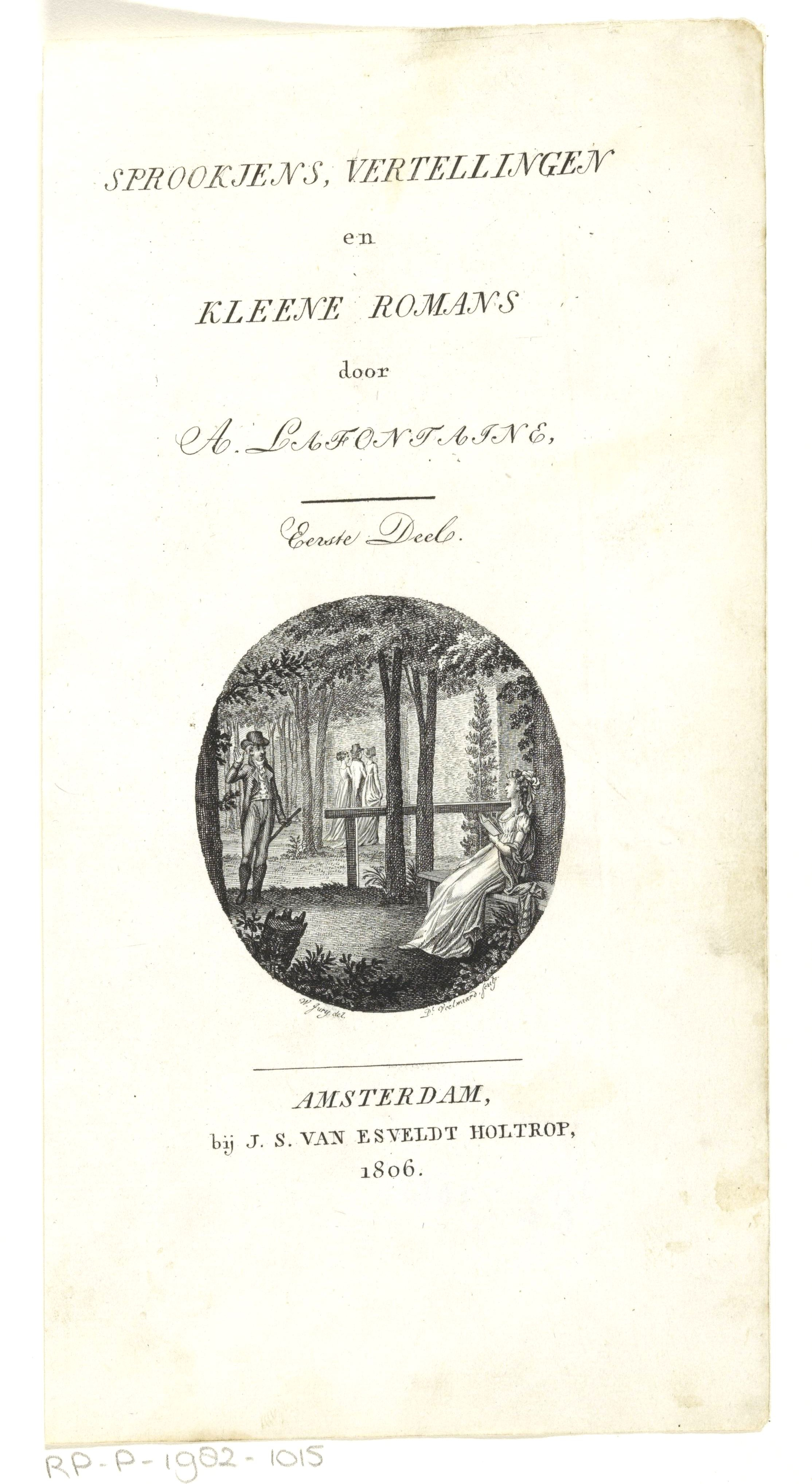 Lezende vrouw in tuin. Titelpagina voor: A. Lafontaine, Sprookjens, vertellingen en kleene romans, 1806